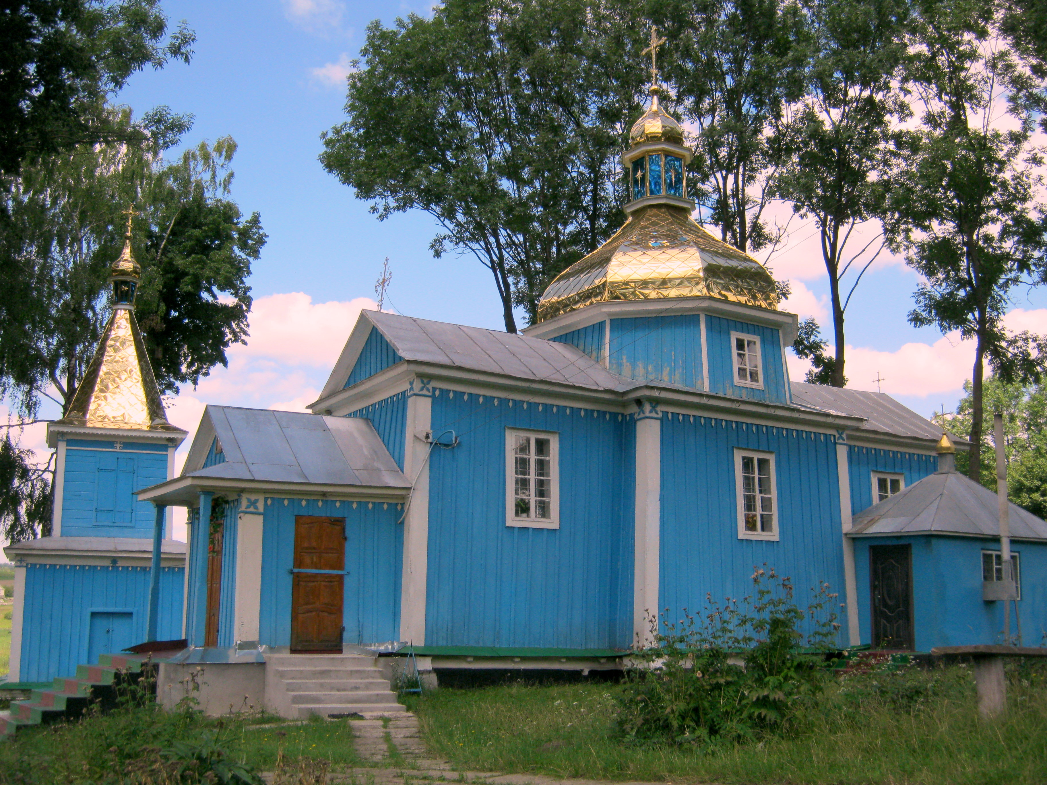 Церква у селі Бакоти Кременецького району Тернопільської області